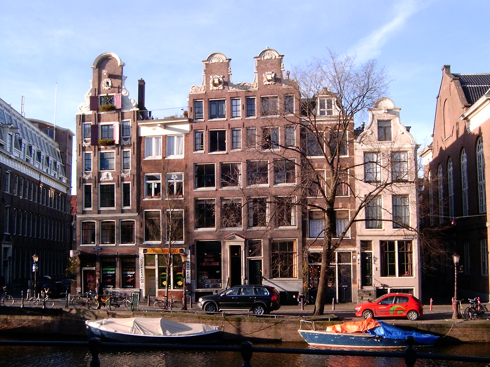 Houses in Amsterdam